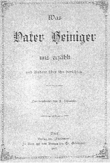 Titelbild von Was Vater Heiniger uns erzählt (Buch von Franz Eugen Schlachter über Johann Ulrich Heiniger)